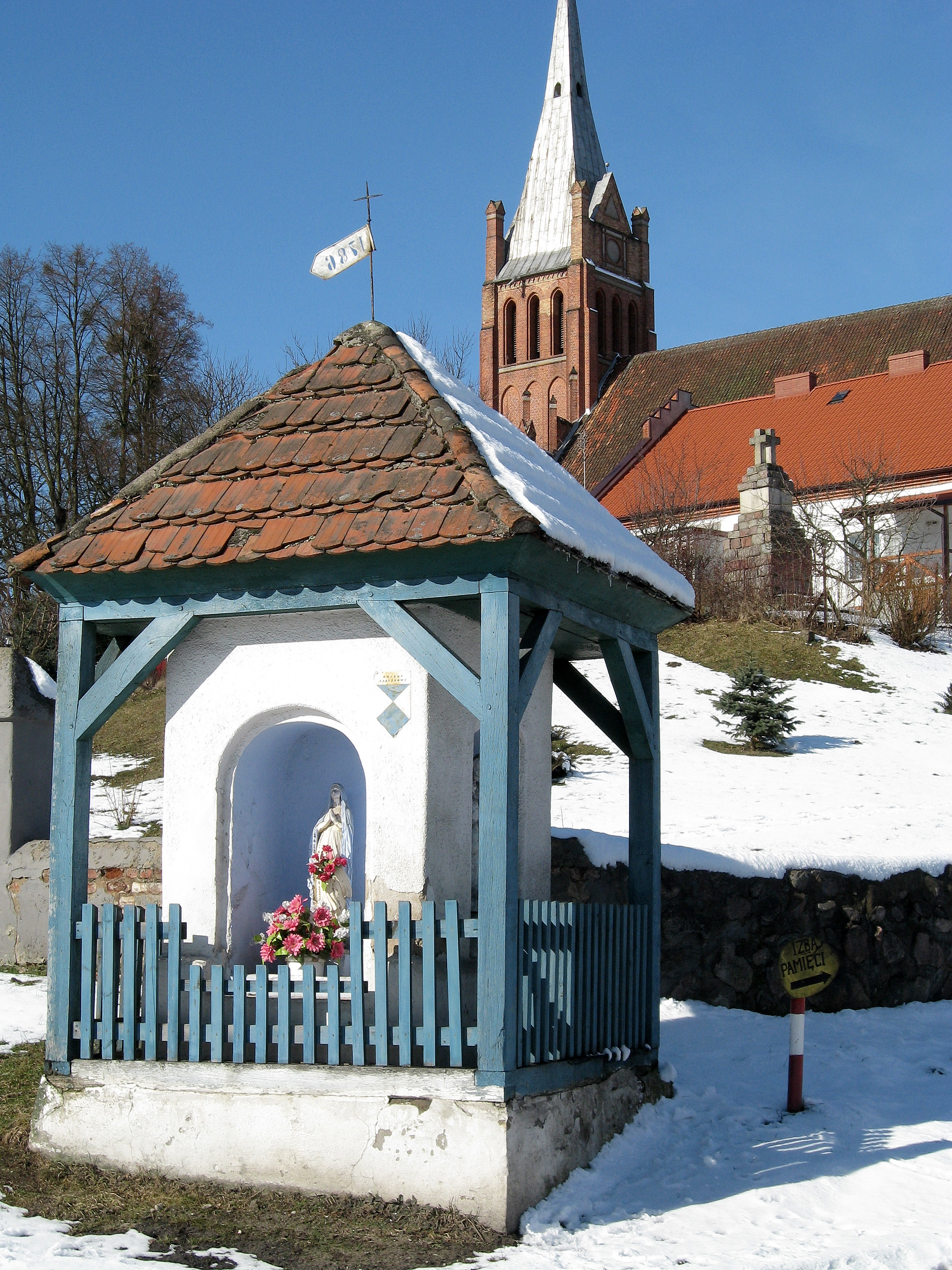 Kapliczka w Brąswałdzie.